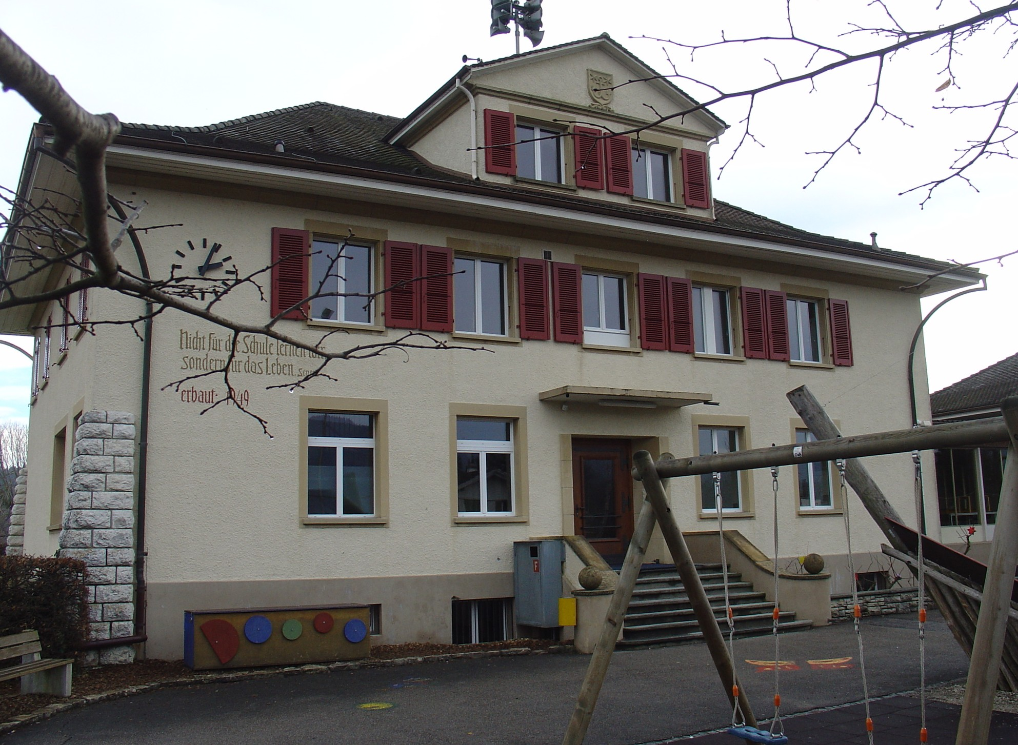 Das Foto zeigt das Schulaus der Primarschule Sutz-Lattrigen-Mörigen in Lattrigen.